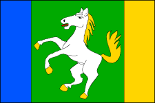 Flag of Lačnov